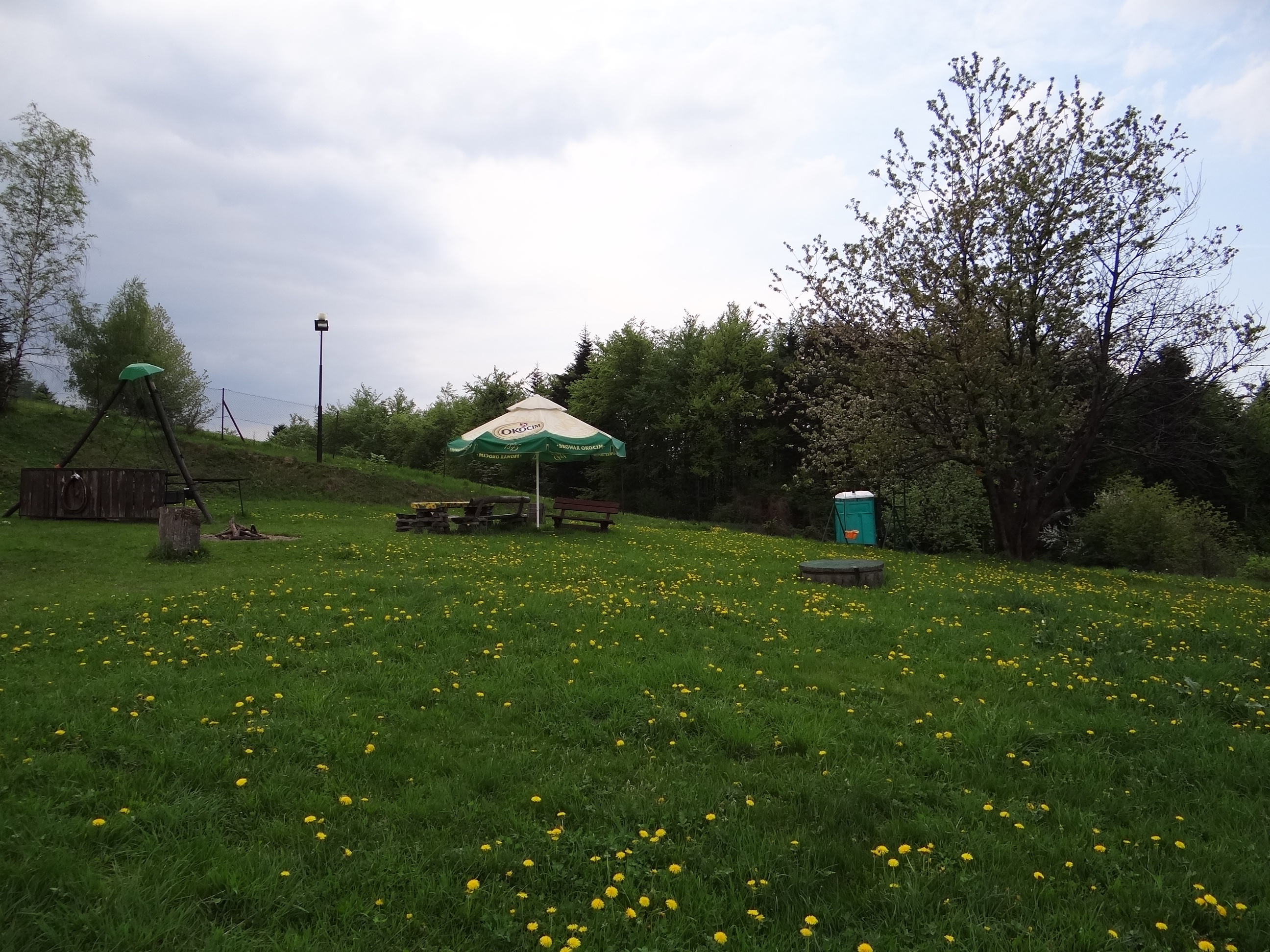 "Bacówka na Zadzielu" w Rozdzielu